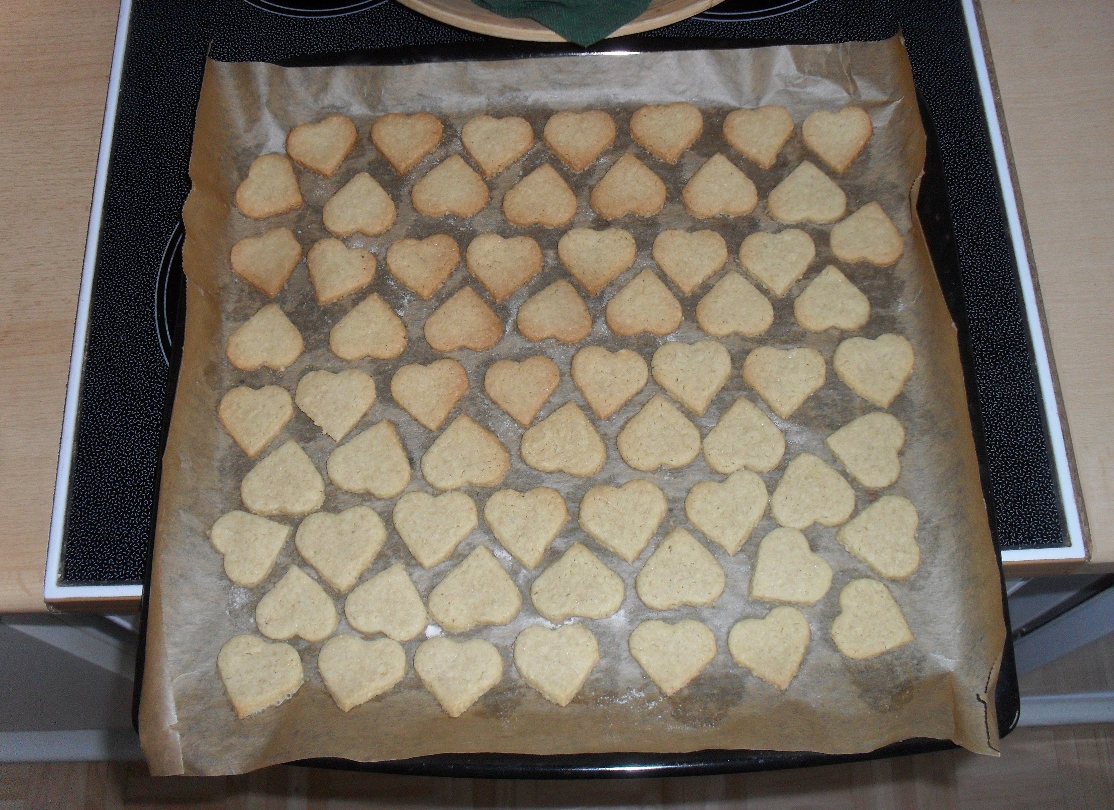 Fertig gebackene Plätzchen noch heiß auf dem Backblech